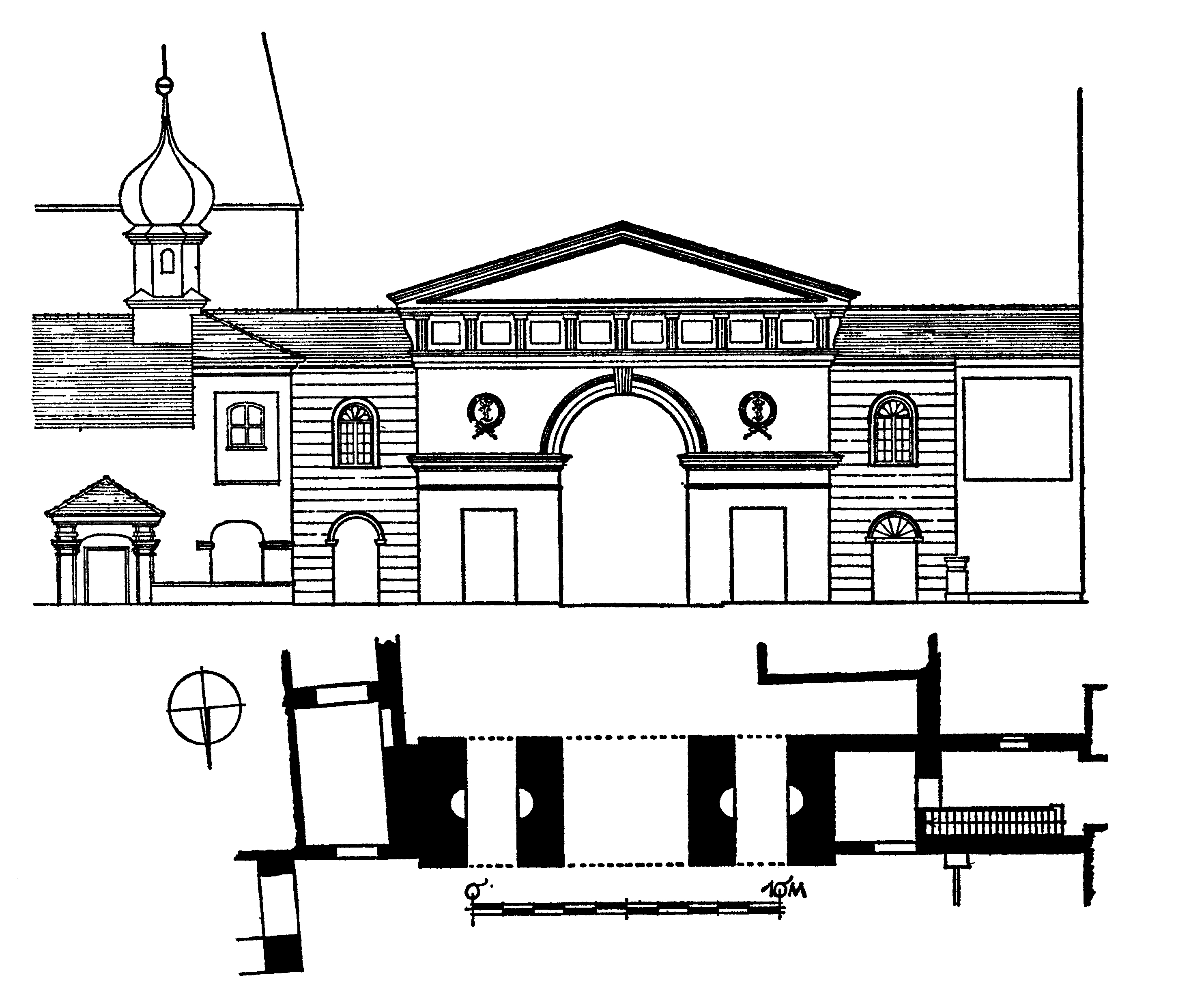 Grundriss und Nordansicht des Ludwigstores in Türkheim, Bayern